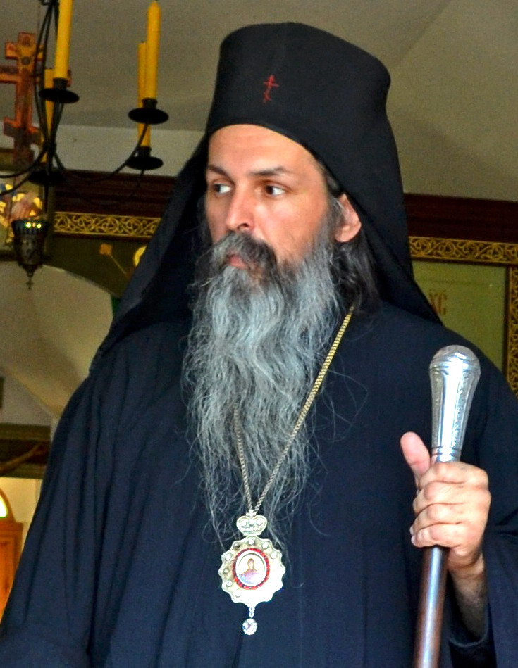 епископ Акакий (Станкович)